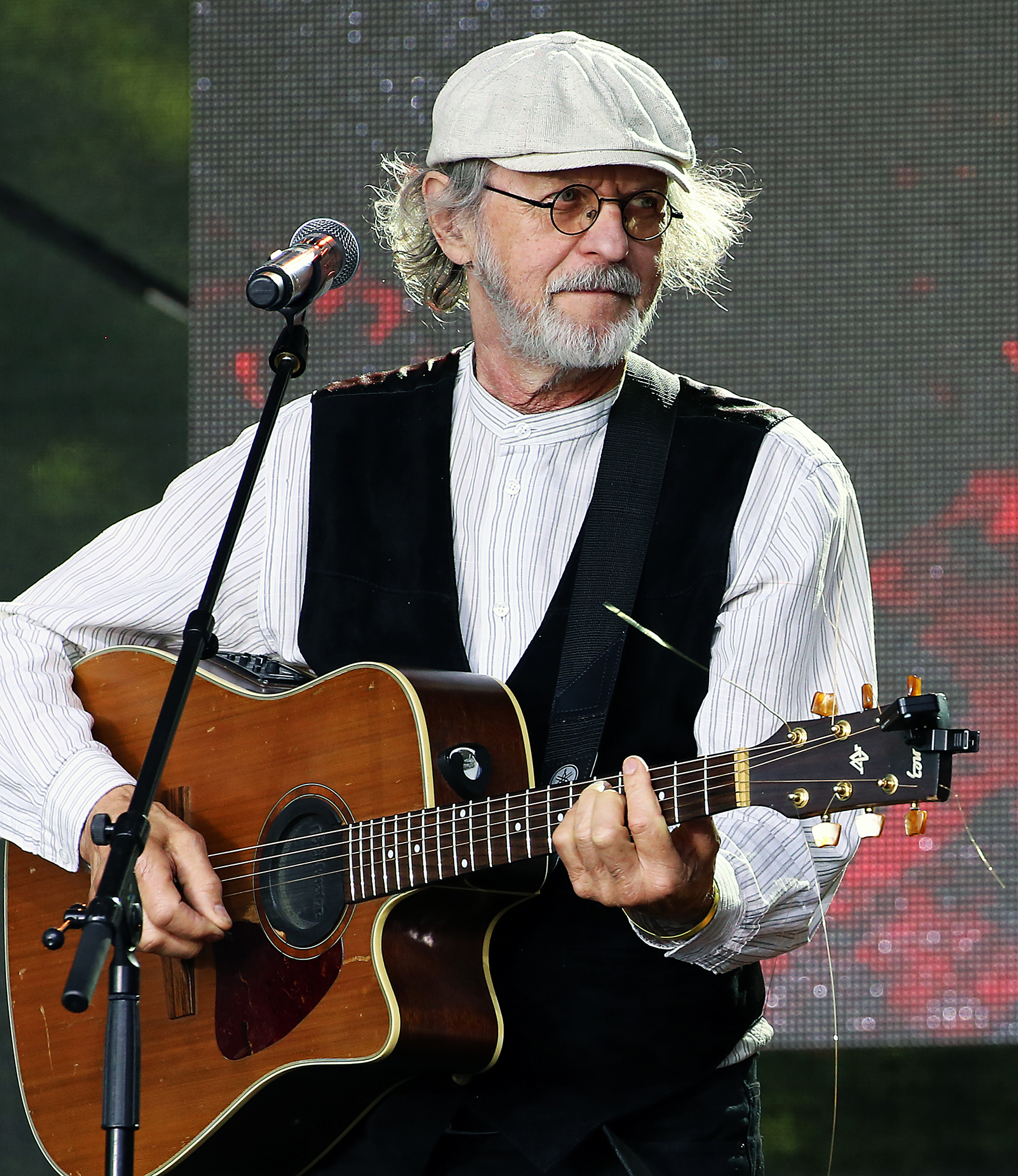 Toomas Kõrvits, Kukerpillid 2017